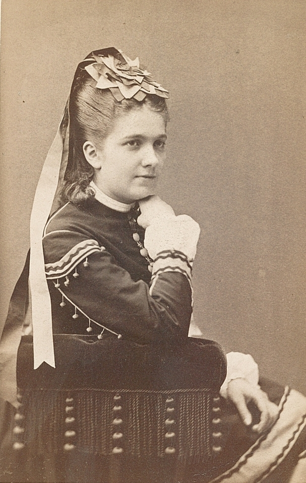 portrett, kvinne, sangerinne, sittende halvfigur, rollebilde, kostyme.